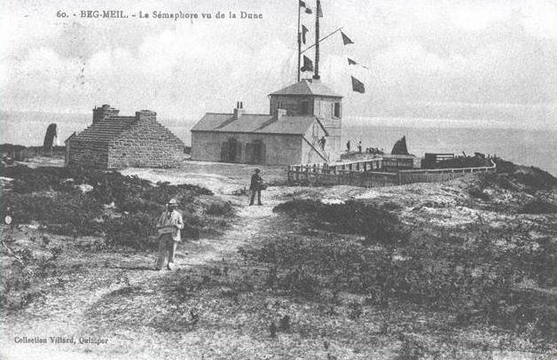 Carte postale. Corps de garde, sémaphore et menhir à Beg Meil